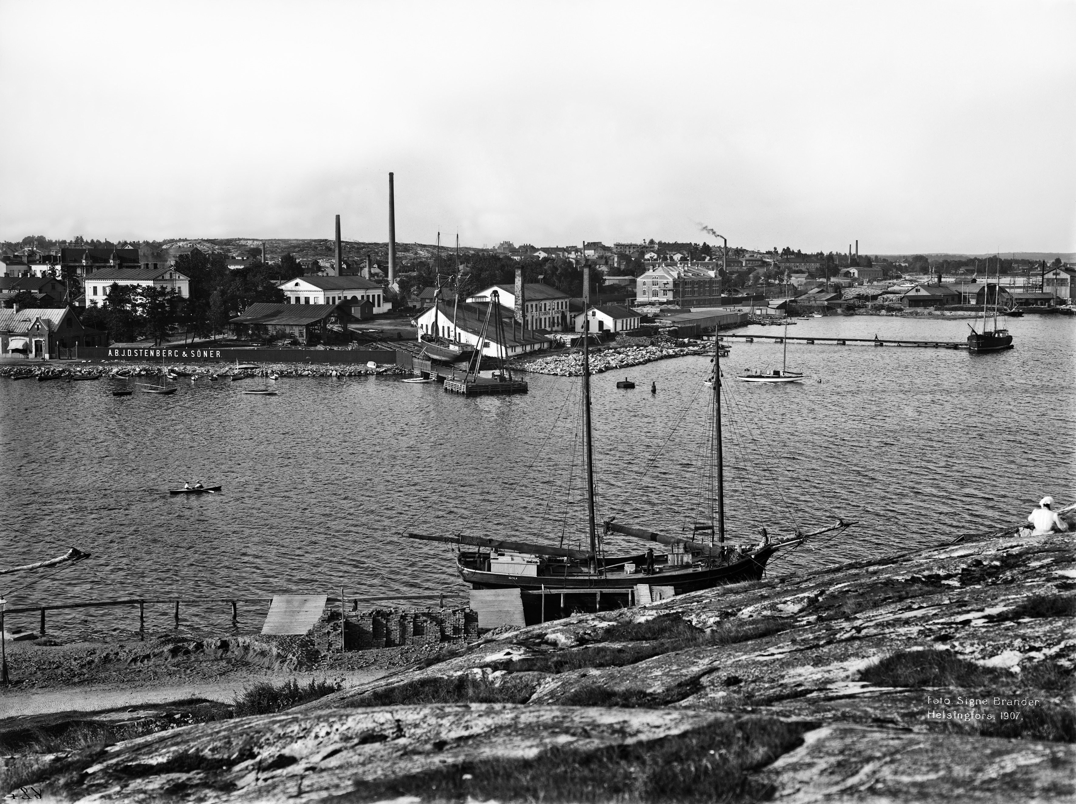 Hakaniemenranta 3, AB J. D. Stenberg & söner; Hakaniemenranta 3, AB J. D. Stenberg & söner. Nykyinen Hakaniemenkatu 2-4. Oikealla Pannukakku. Kuvattu Siltavuorelta koilliseen. -- negatiivi ja vedos, lasi paperi pahvi, mv